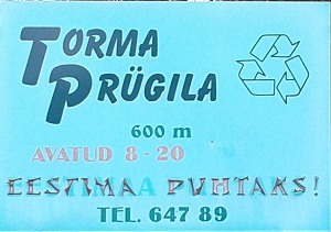 Torma prügila avasilt.